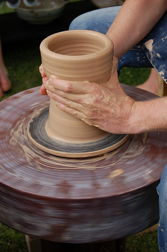 Pottery